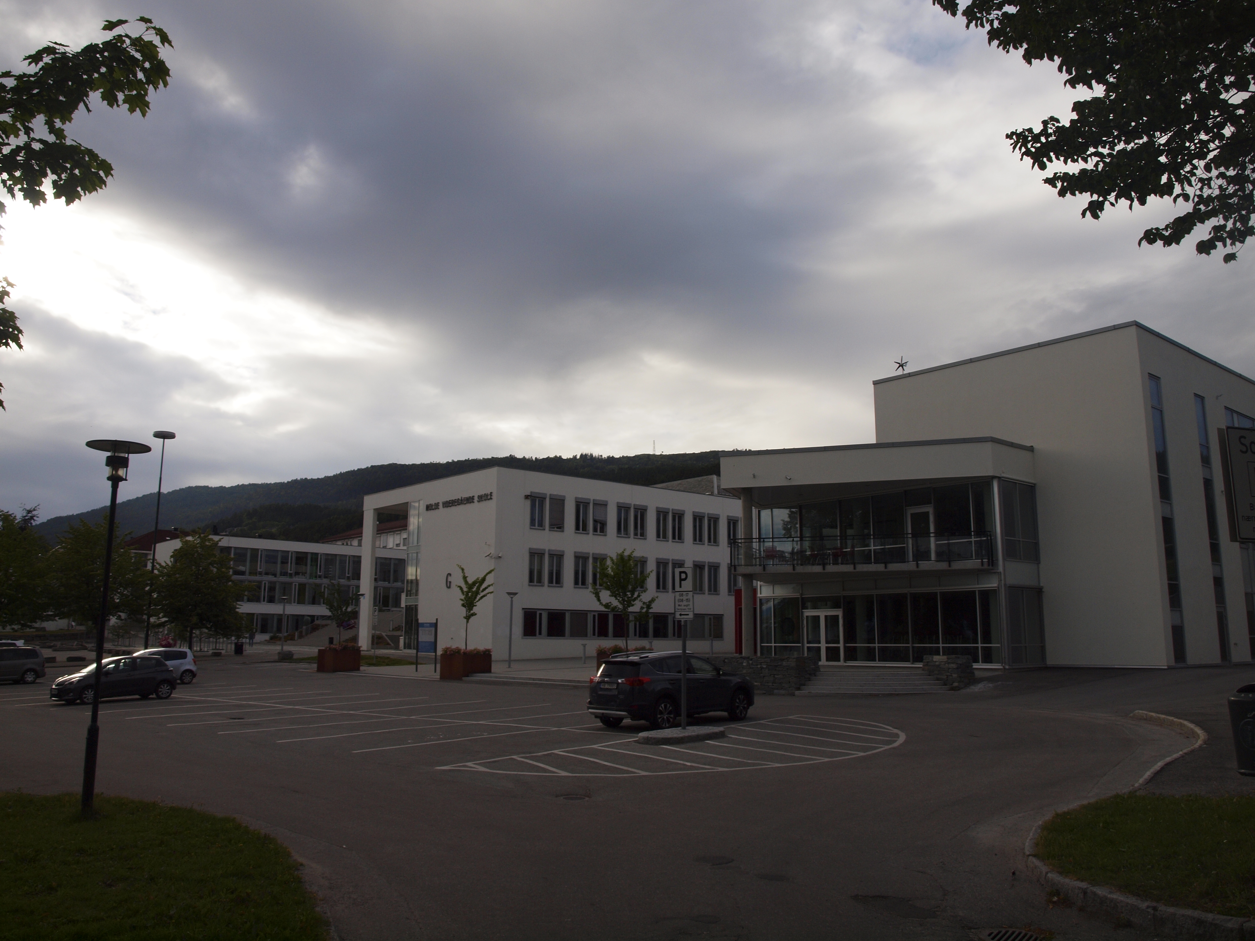 Molde videregående skole (high school) in Molde, Norway